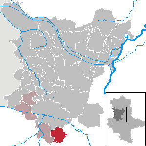 Kroppenstedt in Saxony-Anhalt (Country) - District (Landkreis) Börde